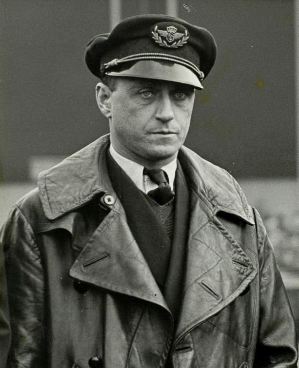 Bemanning "London - Melbourne Race van de Douglas DC-2 "Uiver": vlnr. tweede Bestuurder J.J. Moll. en gezagvoerder Koene Dirk Parmentier.